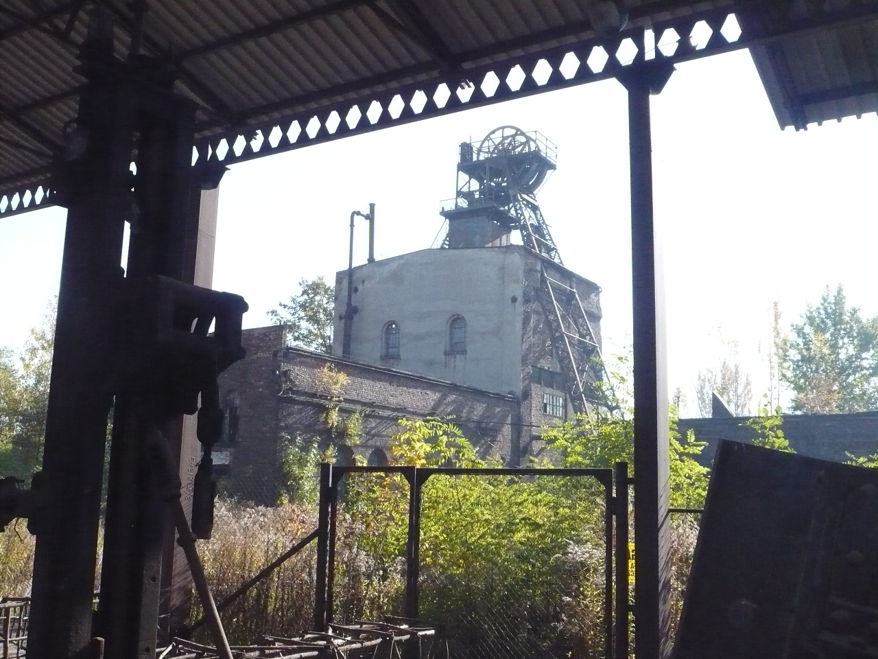 Czeladź, dawna kopalnie "Saturn", widok ogólny na szyb wyciągowy